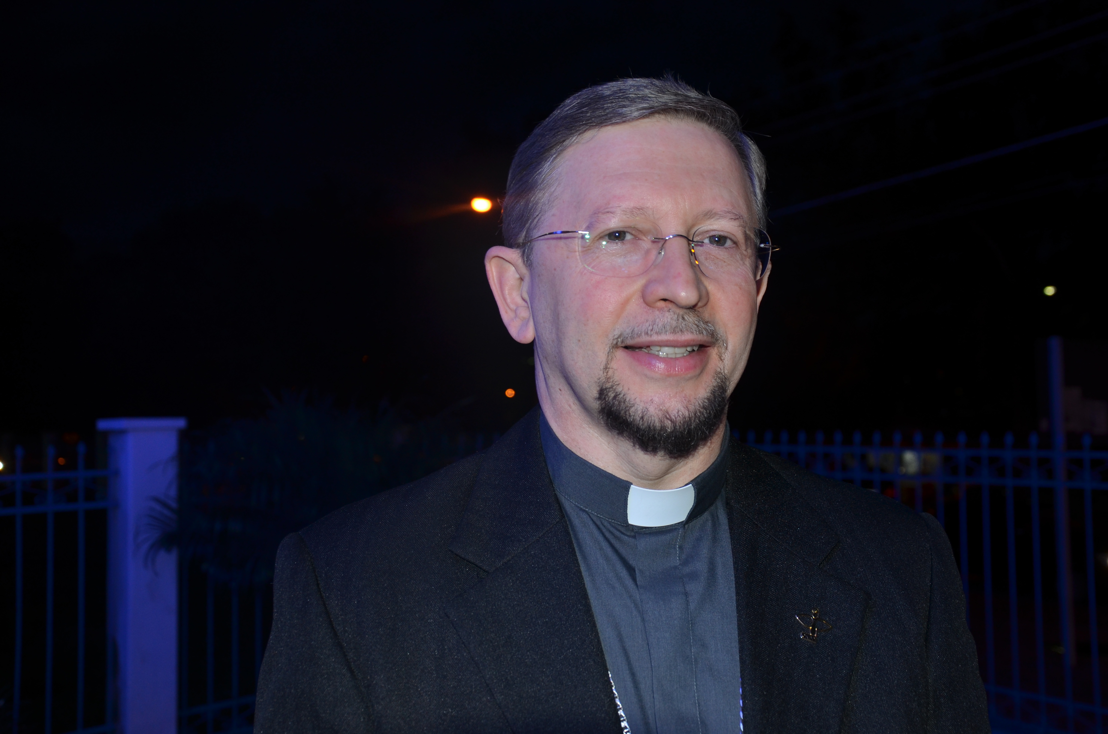 Dom Frei Luís Gonzaga Silva Pepeu